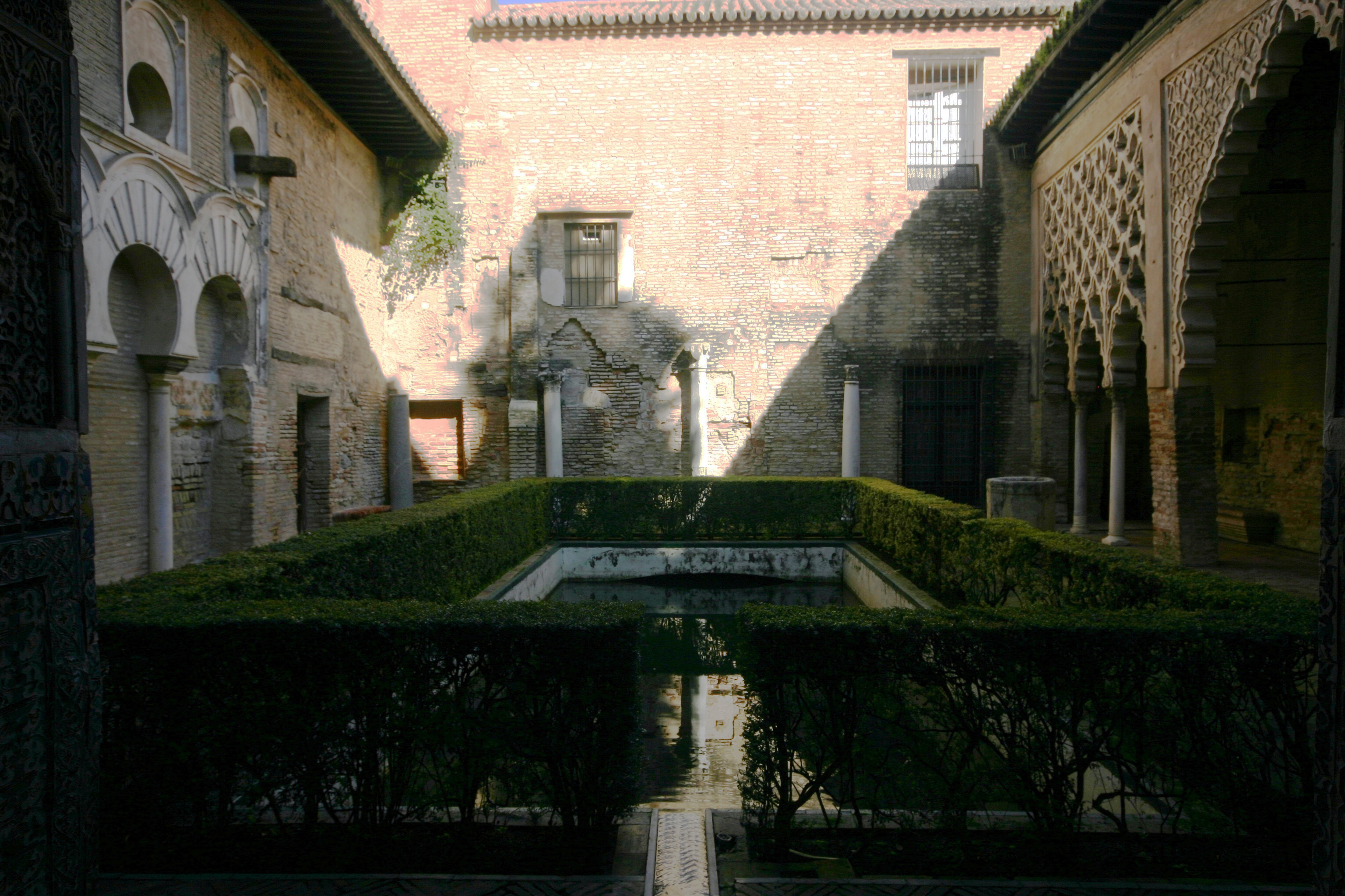 Pátio de Gesso